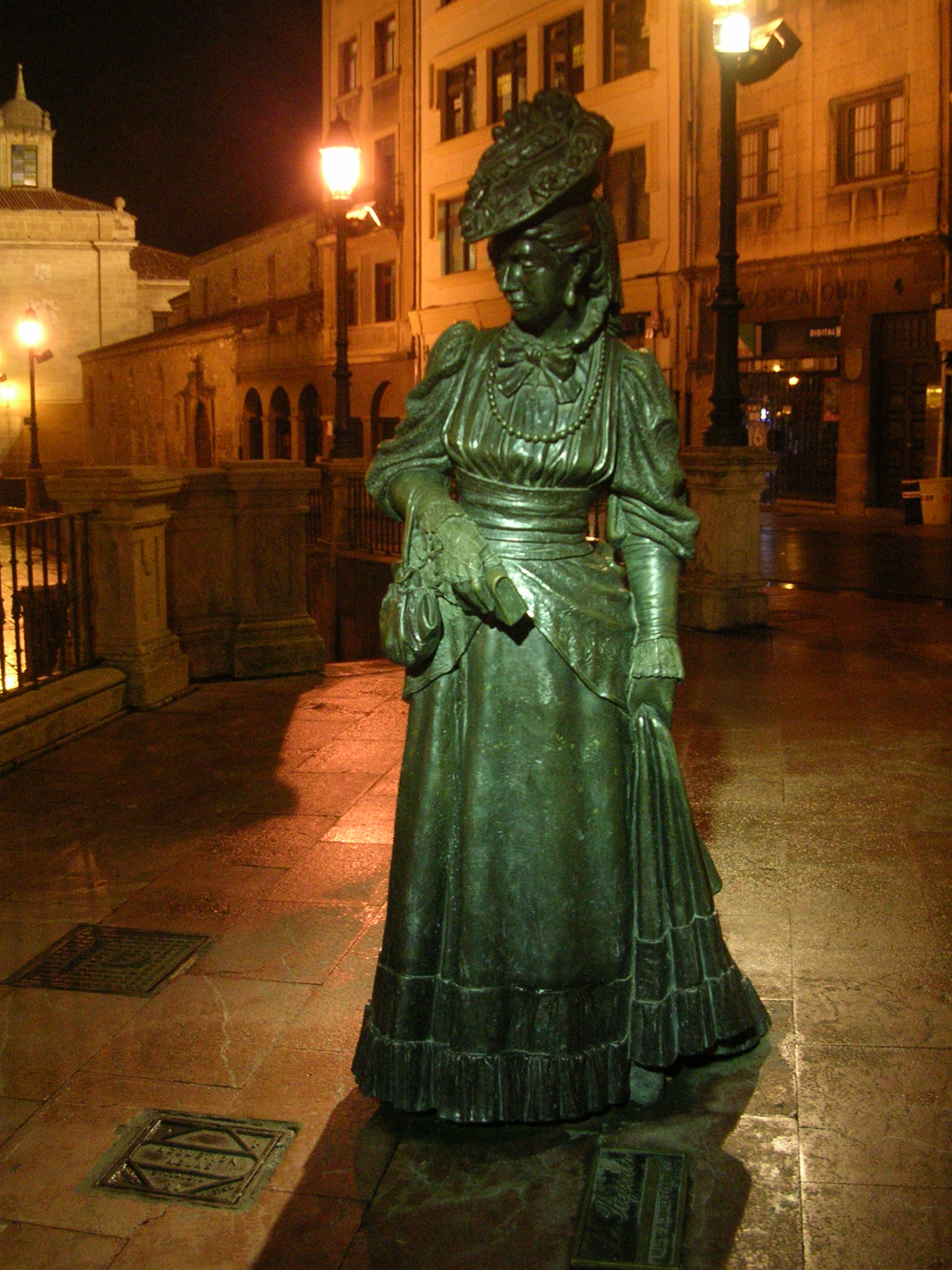 Escultura dedicada a La Regenta en Oviedo, obra del escultor ovetense Mauro Álvarez.Asturias.